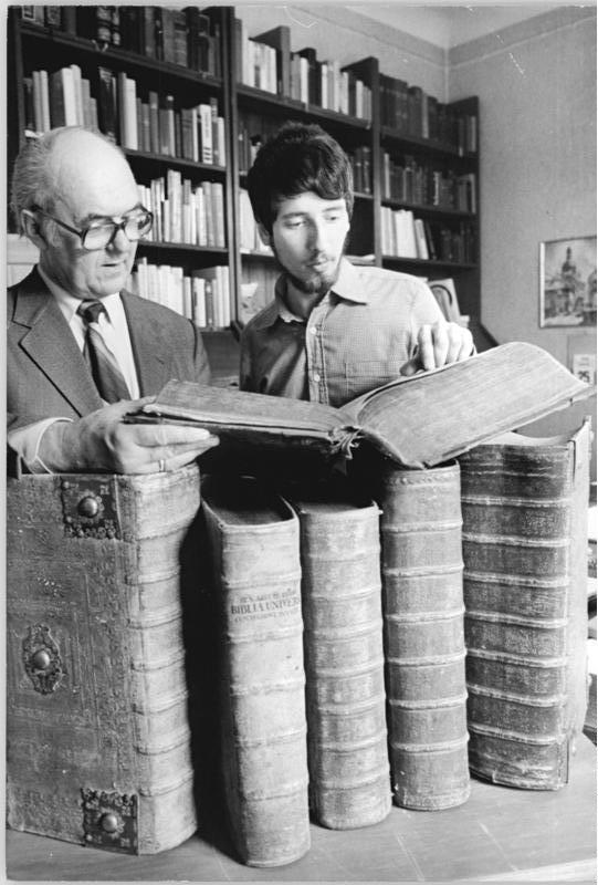 Dresden, Bibelausstellungen ADN-ZB Häßler 12.5.88 Dresden: Bibelausstellungen mit bibliophilen Kostbarkeiten aus dem In- und Ausland stellen Pfarrer Helmut Löffler (l.) und Holger Kretschmar in der Sächsischen Hauptbibelgesellschaft Dresden für Kirchen zusammen. Eine solche Exposition - die nächste wird im Juni in Dresden-Leubnitz gezeigt - enthält rund 200 Bibelausgaben aus einem Zeitraum von etwa 450 Jahren. (siehe 7 und 8N)